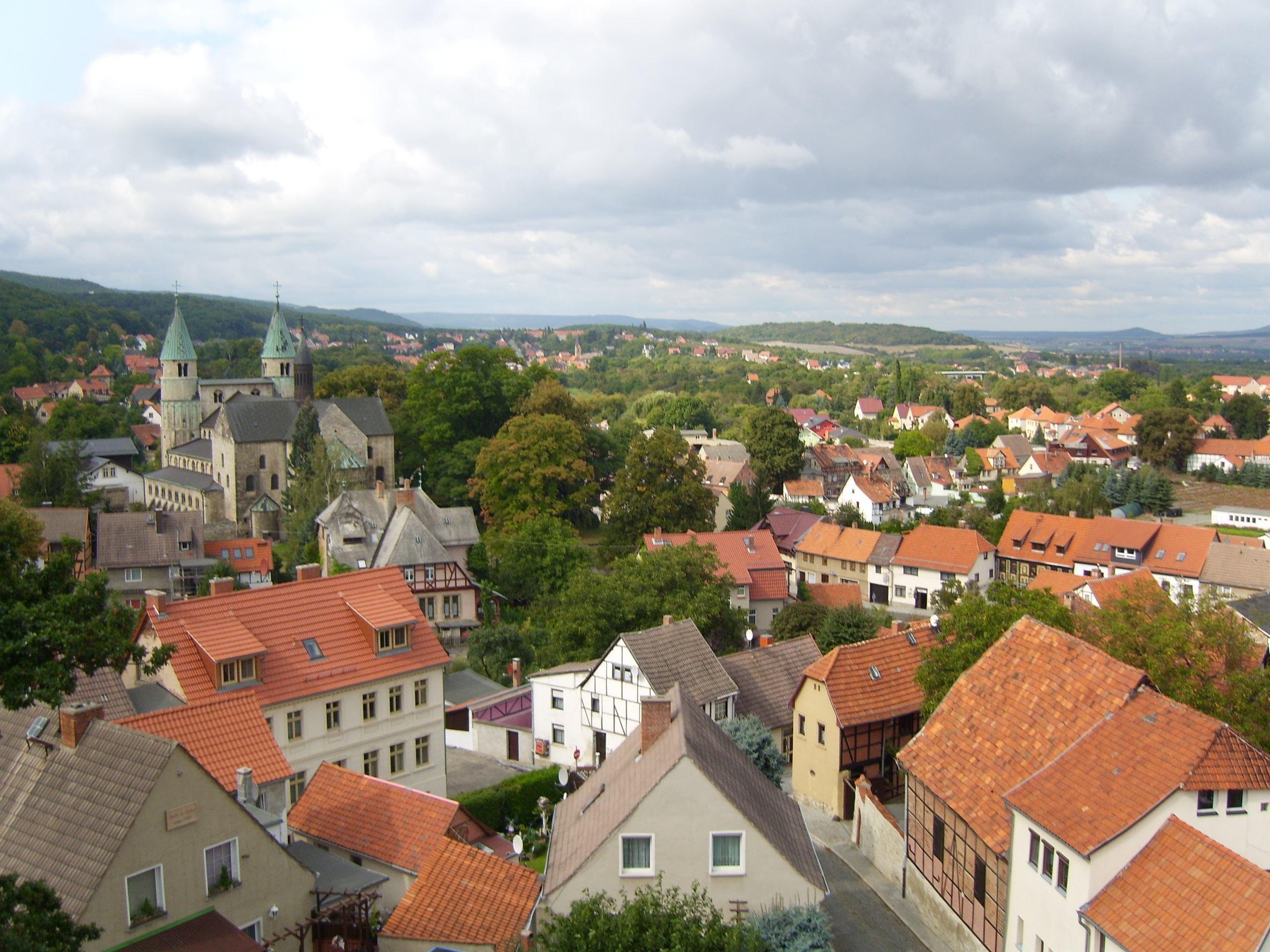 Blick vom Schulturm auf Gernrode